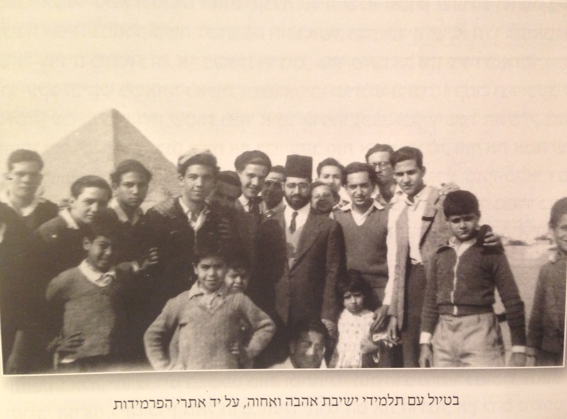 הרב עובדיה יוסף עם תלמידיו במצרים על רקע הפירמידות